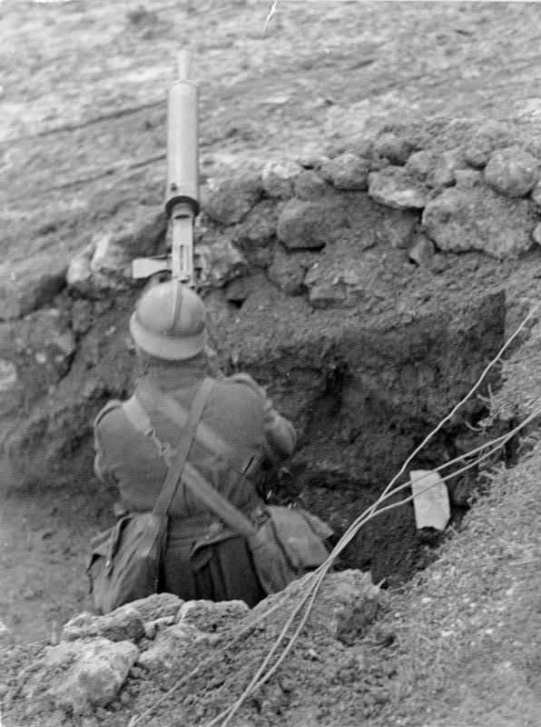 Die grosse Winterschlacht um Guadalajara Anfang März begann die grosse Offensive der nationalen Truppen auf Gudalajara, deren Hauptstoss auf der Strasse Madrid - Saragossa (Carretera de Aragon) geführt wurde. Die ausserordentlich schweren Kämpfe nahmen einen wechselnden Verlauf; das Kriegsglück, das sich im Anfang den Nationalen zuneigte, wandte sich später den Roten zu. Kälte, Hagelsturm, aufgeweichter Boden und scharfe Winde erwiesen sich oft als schlimmere Gegner als das feindliche Feuer. Die Soldaten der ersten beiden freiwilligen Divisionen lagen fünf Tage lang in Schlamm und Dreck, ohne warmes Essen. Zum ersten Male im spanischen Bürgerkrieg wurden ausschließlich motorisierte Einheiten eingesetzt. MG-Nest an der Strasse. Fot. H.G. von Studnitz